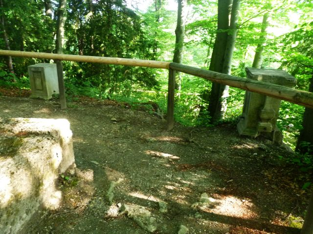 Bürglstein_(Salzburg)-letzte_Postamente